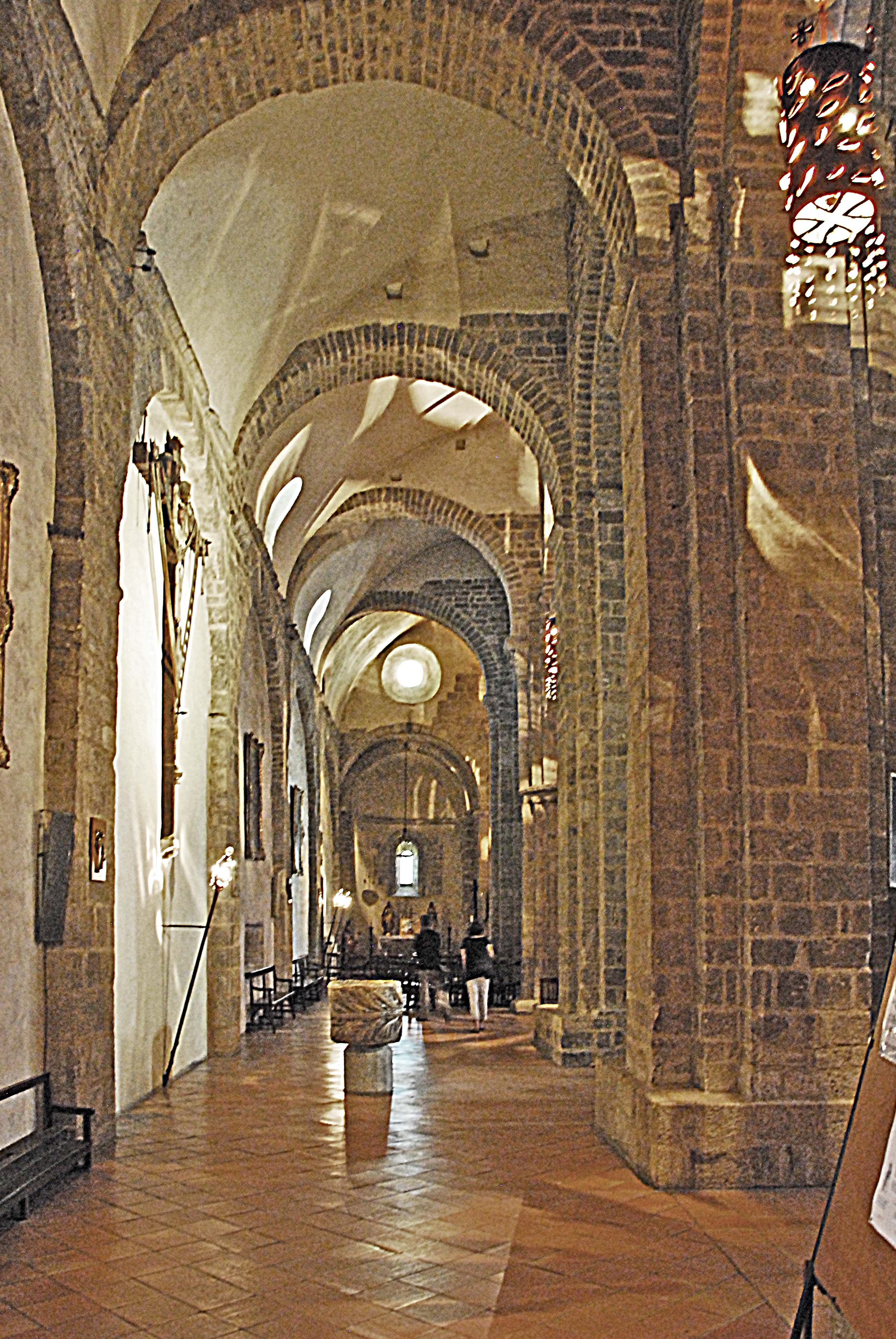 Ste-Eulalie-et-Ste-Julie_d’Elne, nördl. Seitenschiff zum Chor